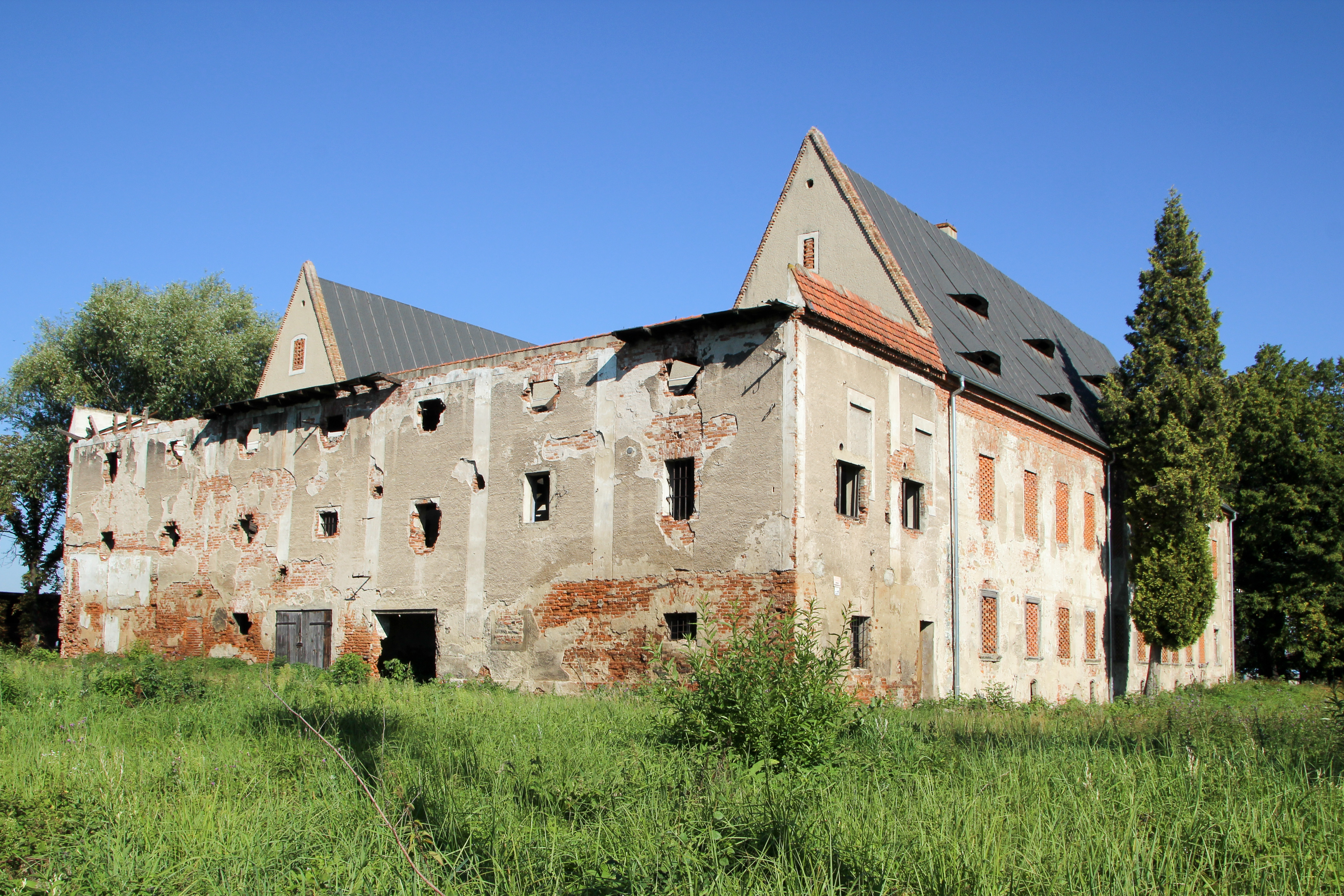 Siestrzechowice – wieś w Polsce położona w województwie opolskim, w powiecie nyskim, w gminie Nysa.